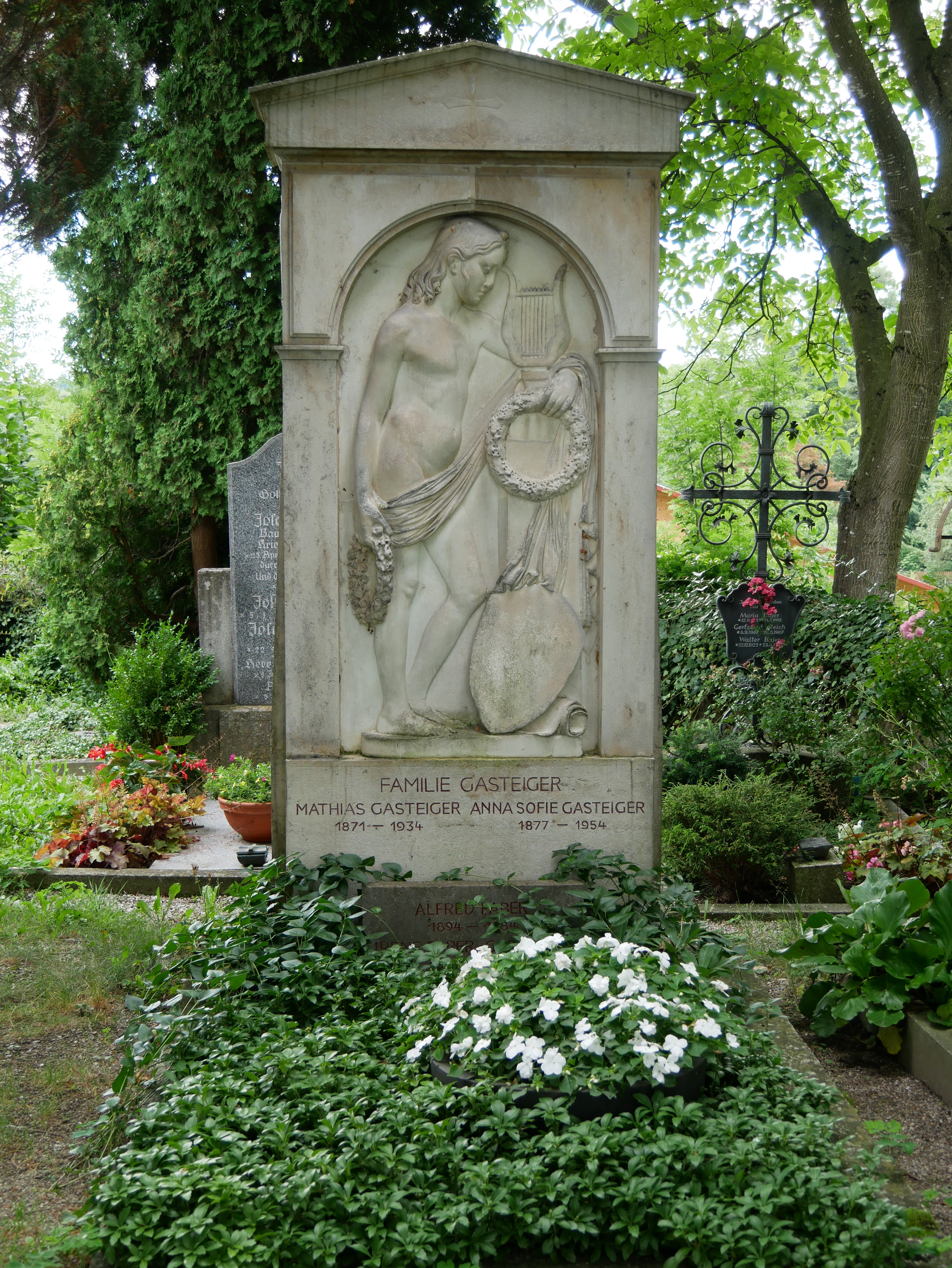 Friedhof der Kirche St. Ulrich in Holzhausen: Grab von Mathias Gasteiger und seiner Frau Anna Sofie Gasteiger